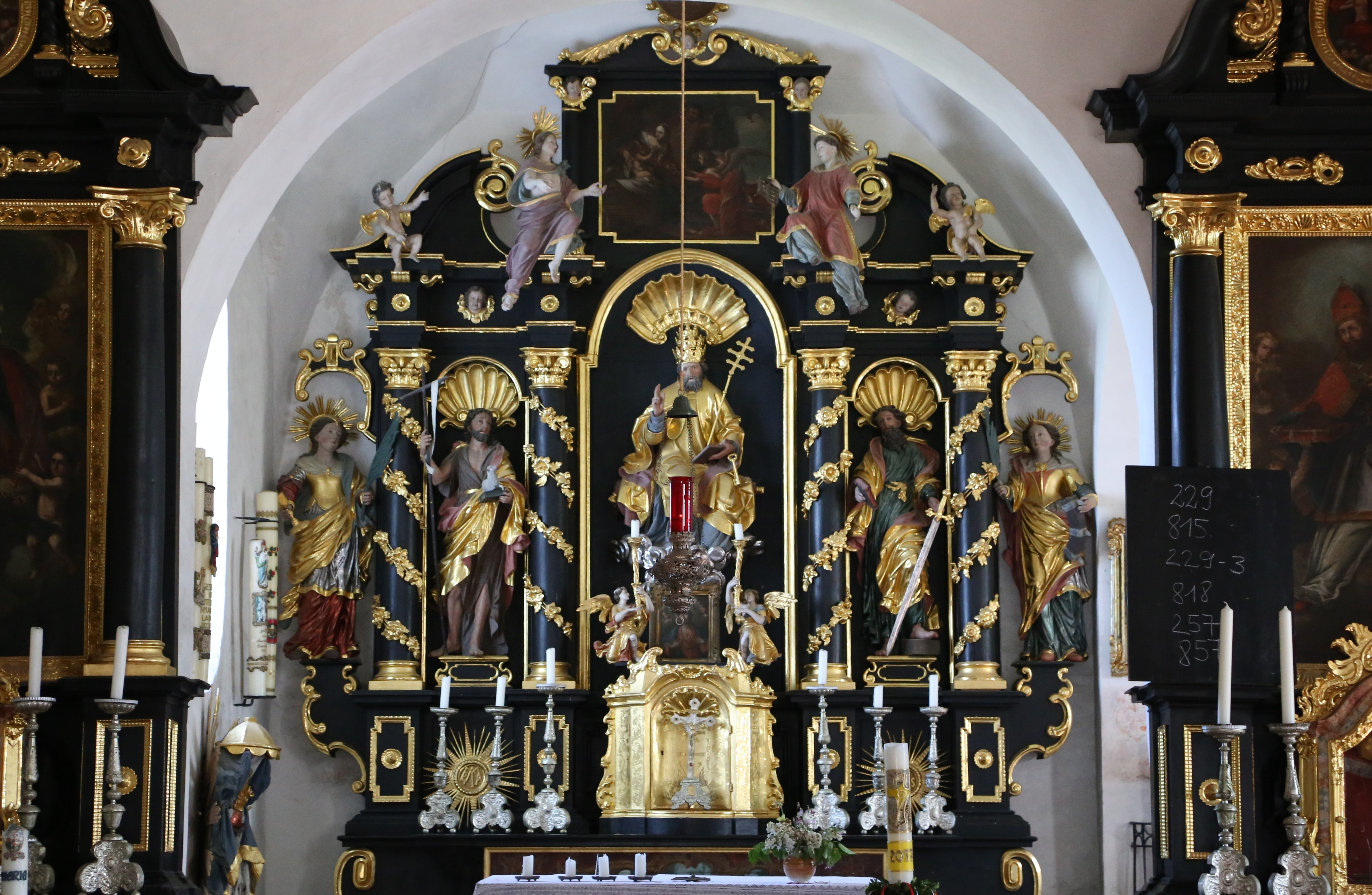 Petersberg 1. Wallfahrtskirche St. Peter, 1135 als Klosterzelle gegründet, später Propstei, Saalbau mit Satteldach und Nordturm mit Schopfwalmdach, Langhaus und Altarraum geweiht 1139, 1605-10 und 1630 Ausbau durch Hans Krumpper, 1657 Westempore; mit Ausstattung; auf dem Kleinen Madron.